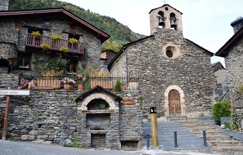 Església de Sant Serni de Llorts